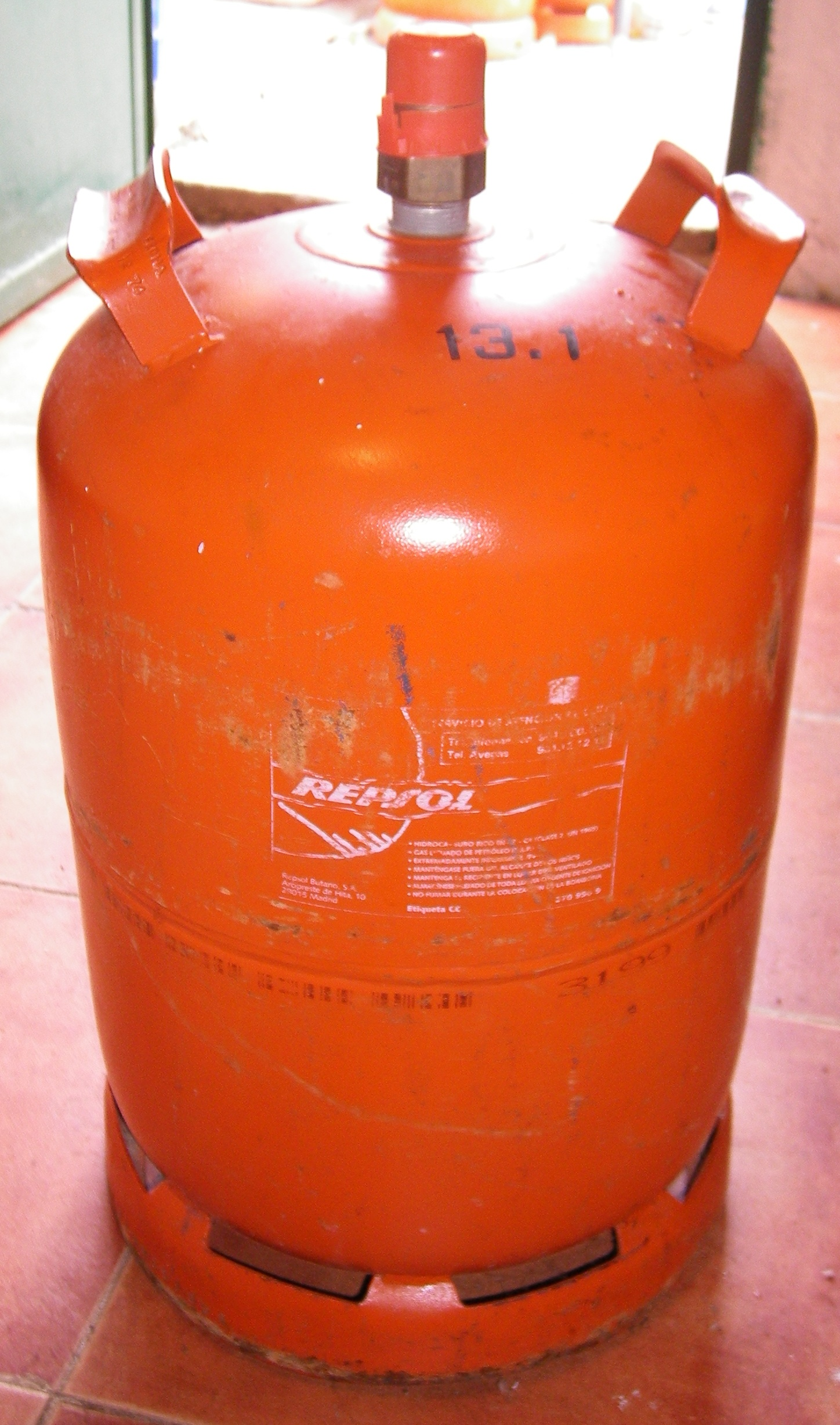 Fotografía de un bombona de butano tipica de España. Que todavia tiene precinto o tapón.